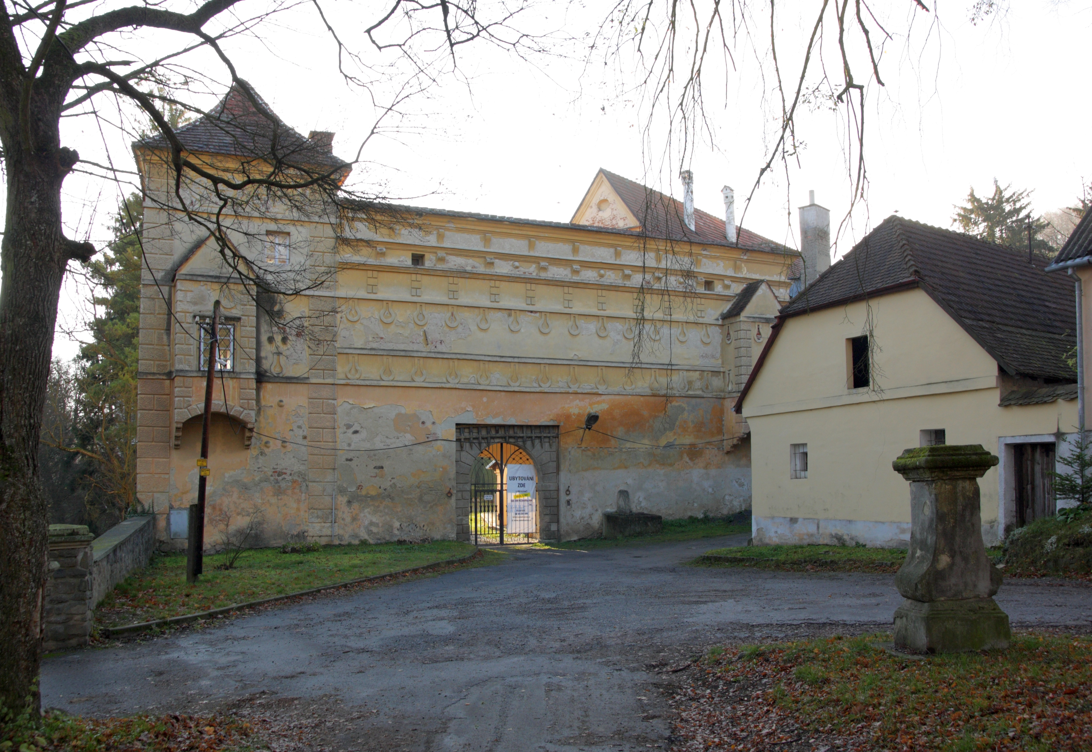 Račice (Račice-Pístovice) - zámek, brána